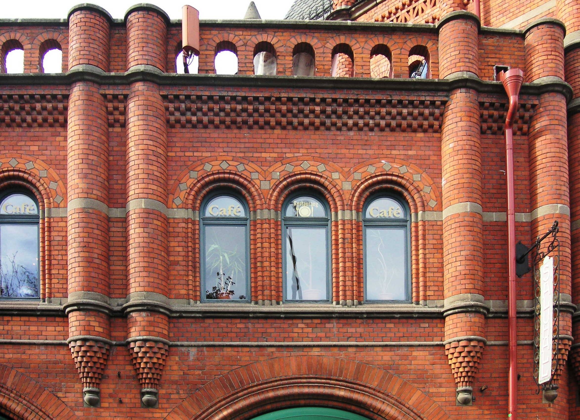 Östermalms Saluhall i Stockholm 2007